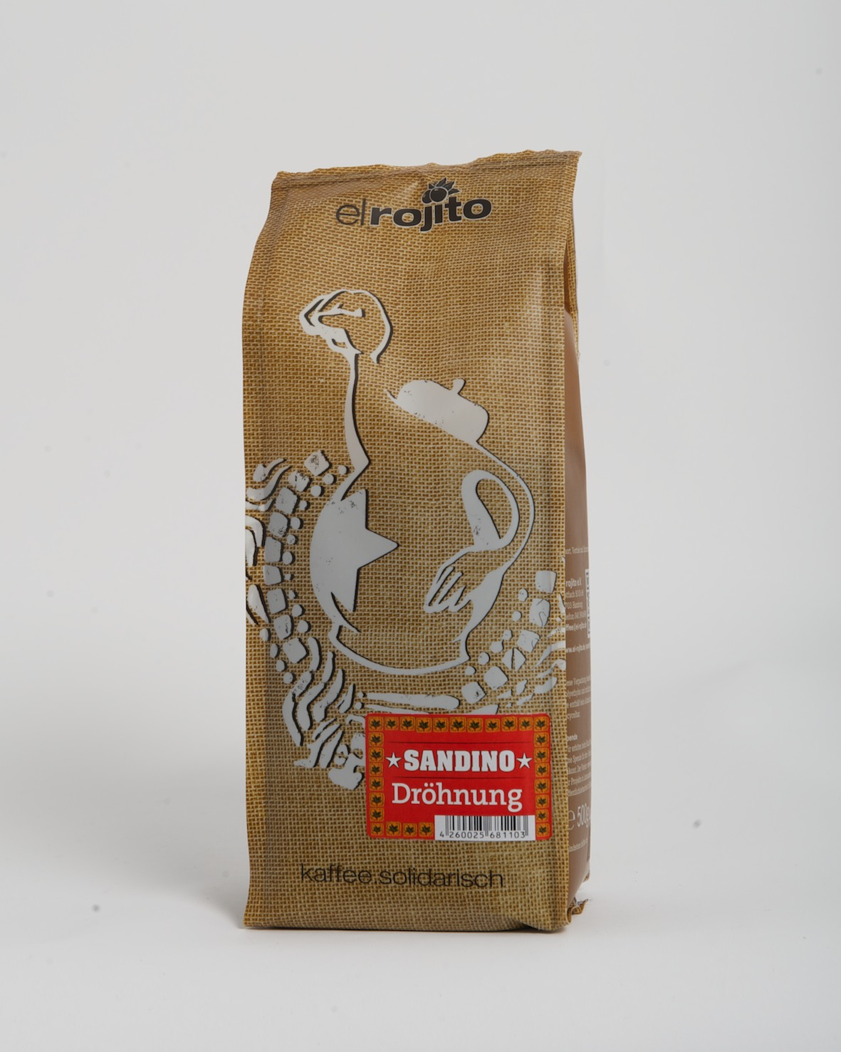 Sandino Dröhnung